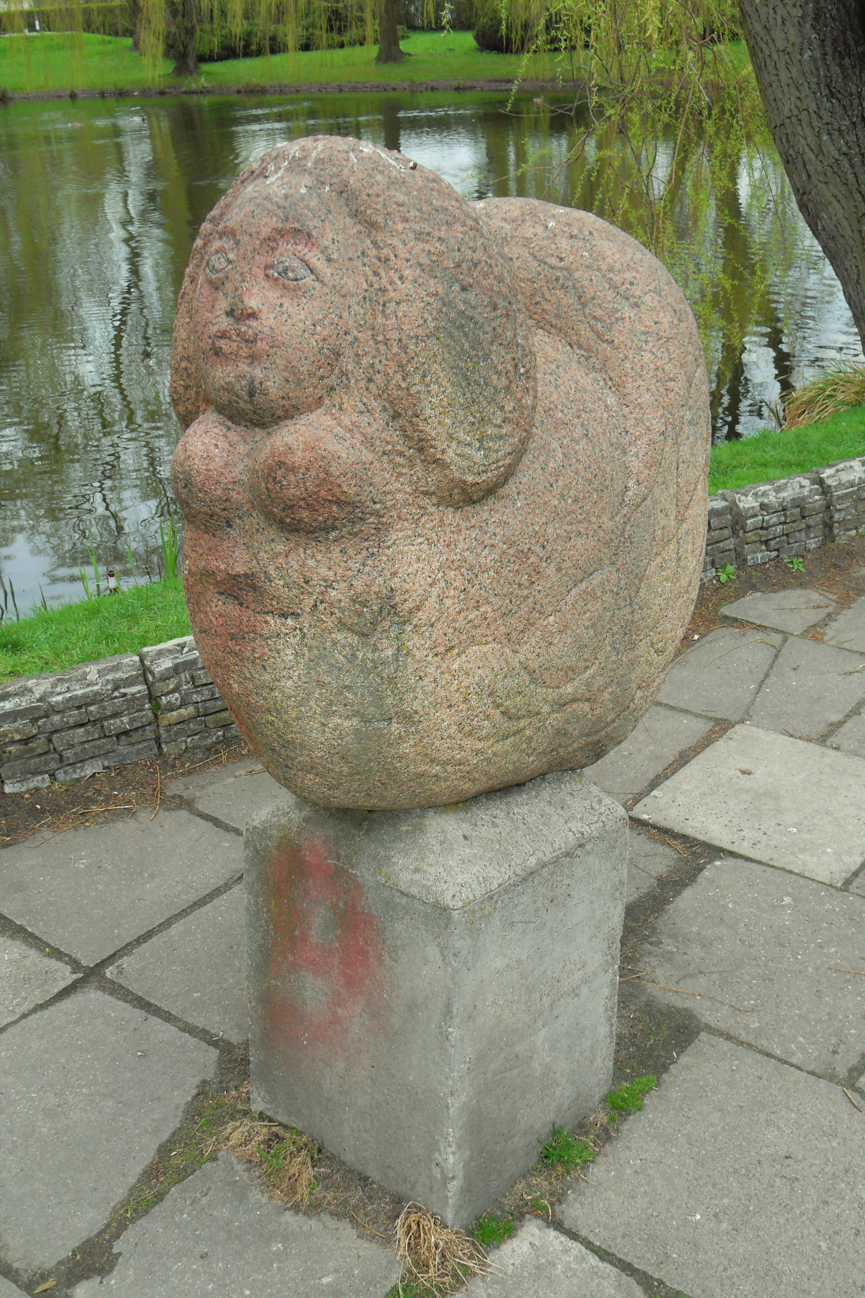 Jedna z grupy czterech rzeźb plenerowych na terenie Parku Oruńskiego w Gdańsku.